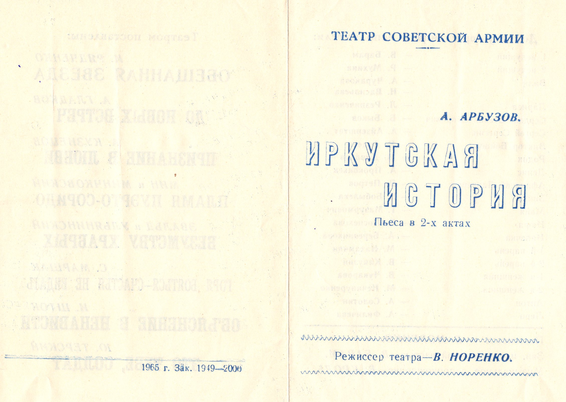 Программка спектакля